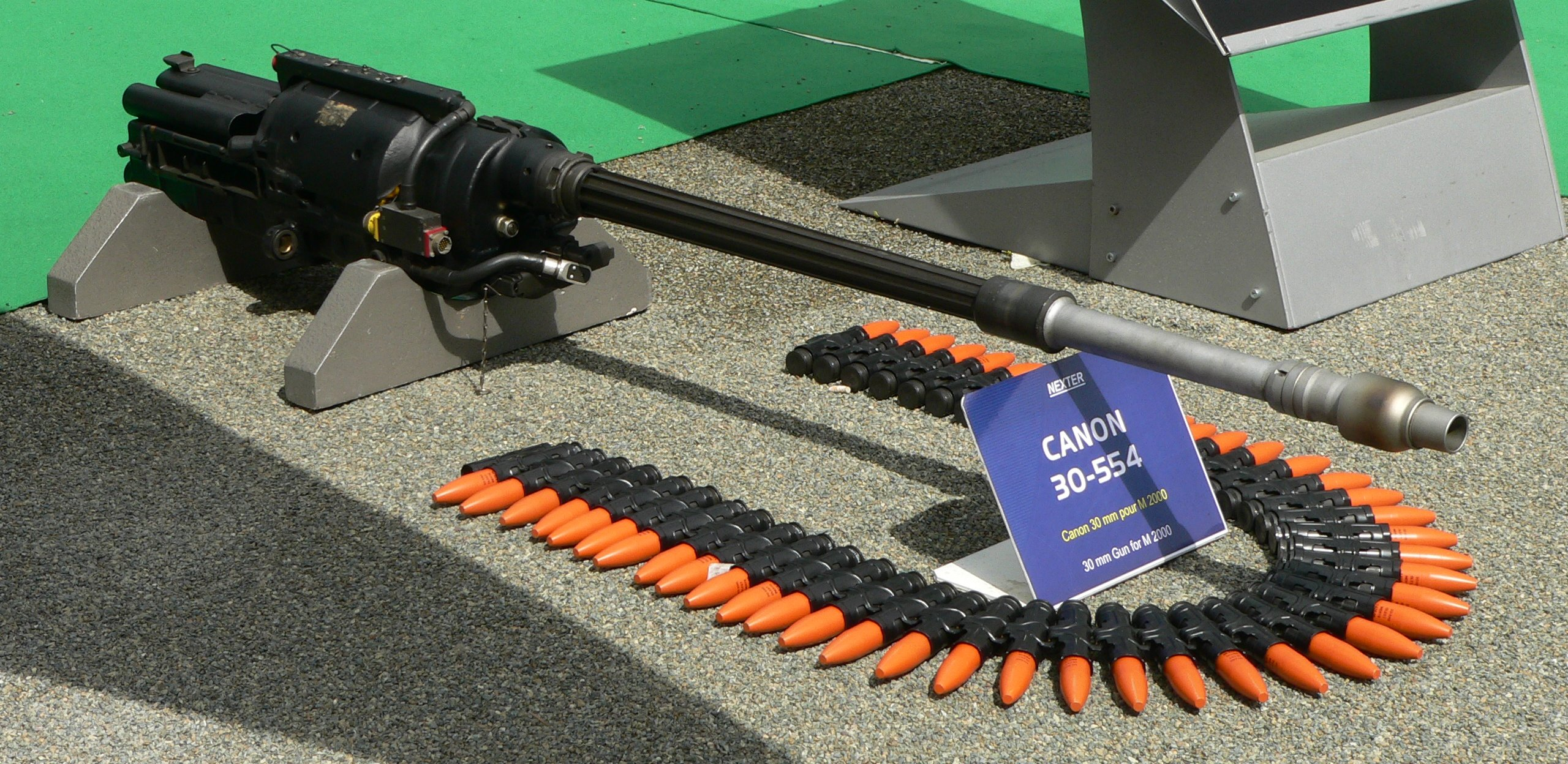 Dassault Mirage 2000: DEFA 554 cannon